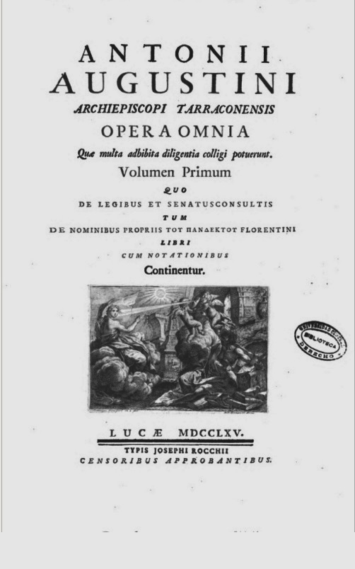 Portada del primer volum de l'obra "Opera omnia" d'Antoni Agustí i Albanell. Lucae (Lucca) : Typis Josephi Rocchii, 1765.